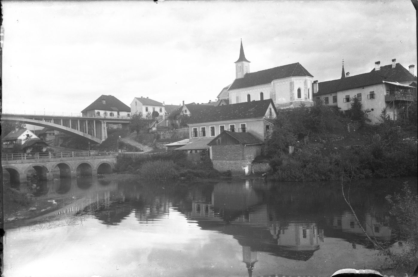 Naselje Črnomelj